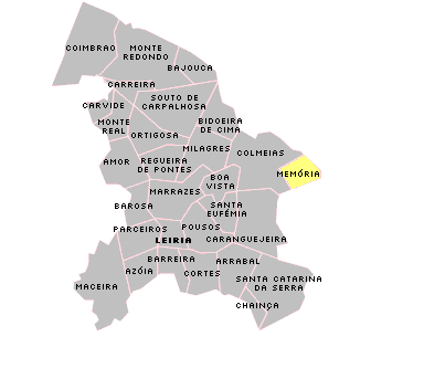 Localisation de Memoria.PNG sur la freguesia de Leiria.